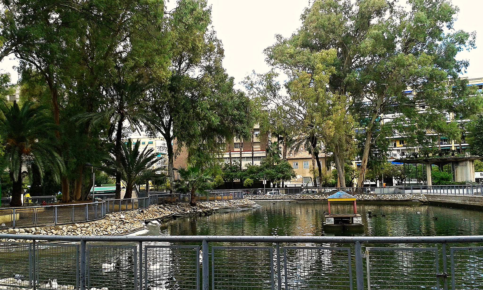 Jardín del Salitre o La Pólvora (Murcia).